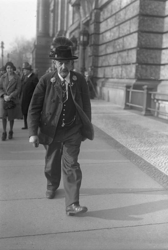 Der Reichstagsabgeordnete Eisenberger legte den Vorsitz des bayerischen Bauernbundes nieder. Aufnahme des bayerischen Reichstagsabgeordneten Eisenberger.